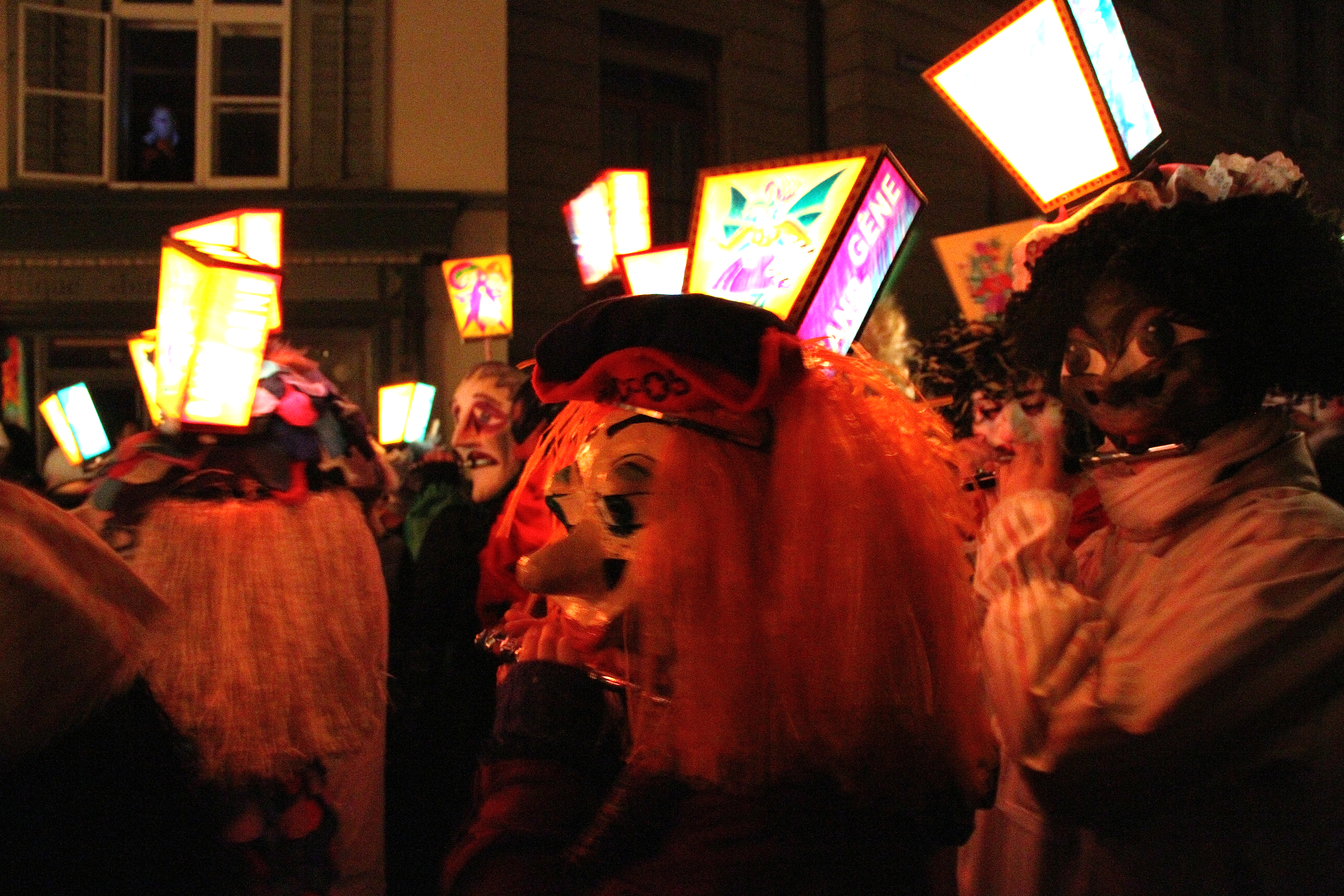 Morgestraich Carnaval de Bâle (Suisse) 18 février 2013